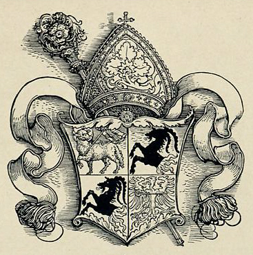 Hugo Gerhard Ströhl: "Heraldischer Atlas". Stuttgart 1899. Tafel 50, Kirchliche Wappen, Bild 2, Wappen des Christoph von Schroffenstein, Bischof von Brixen